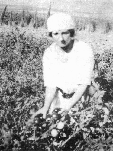 Golda Meir working in kibbutz Merhavia